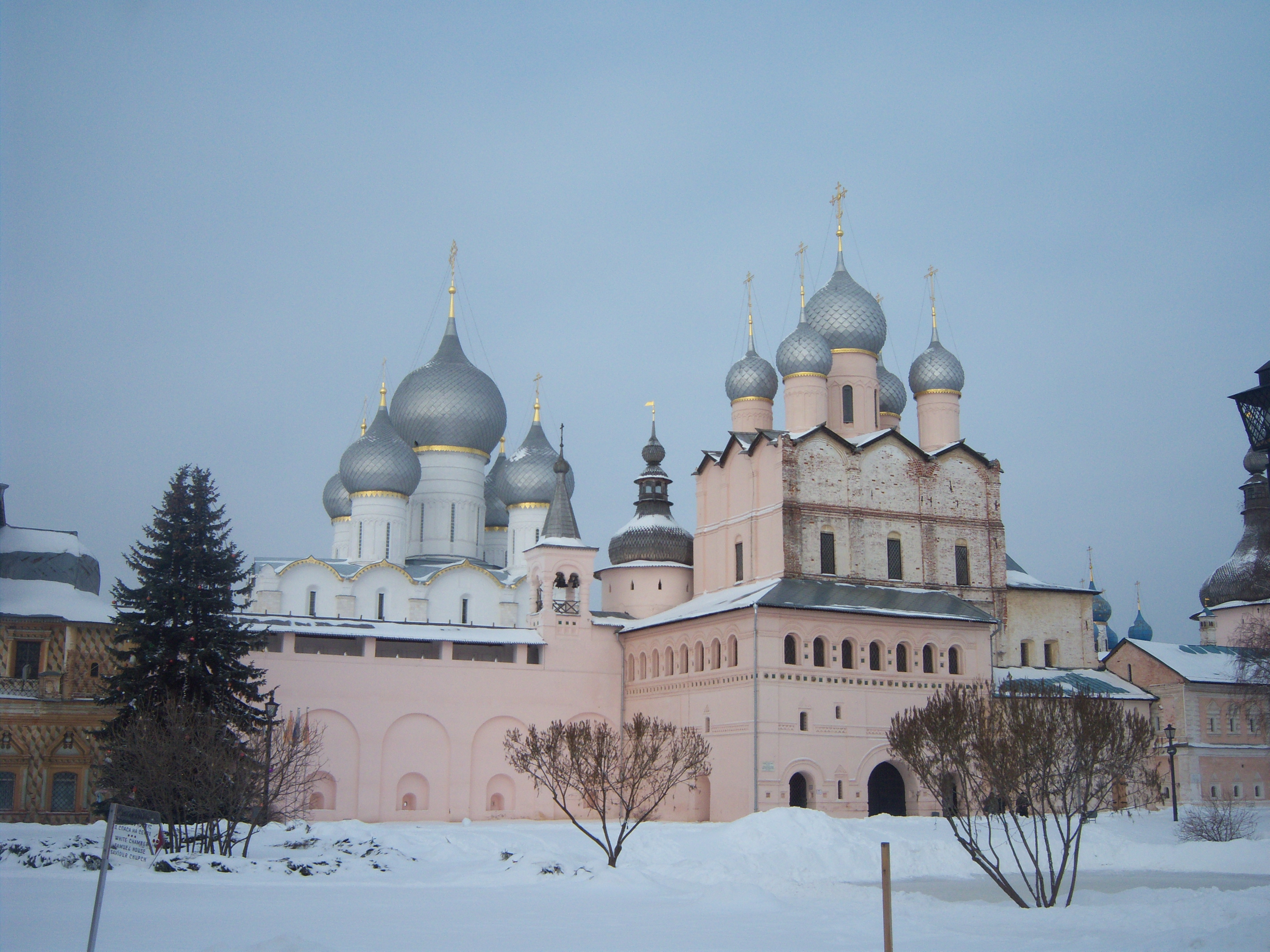 На этом снимке видны купола Успенского собора 11 века